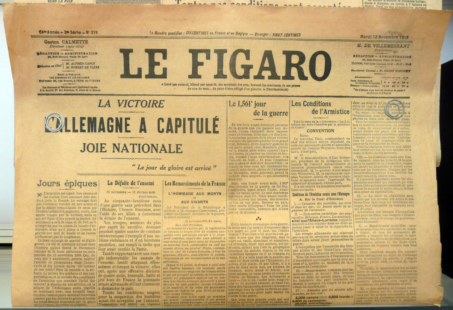 Première page du journal Le Figaro le 12 novembre 1918 annonçant la capitulation de l'Allemagne.